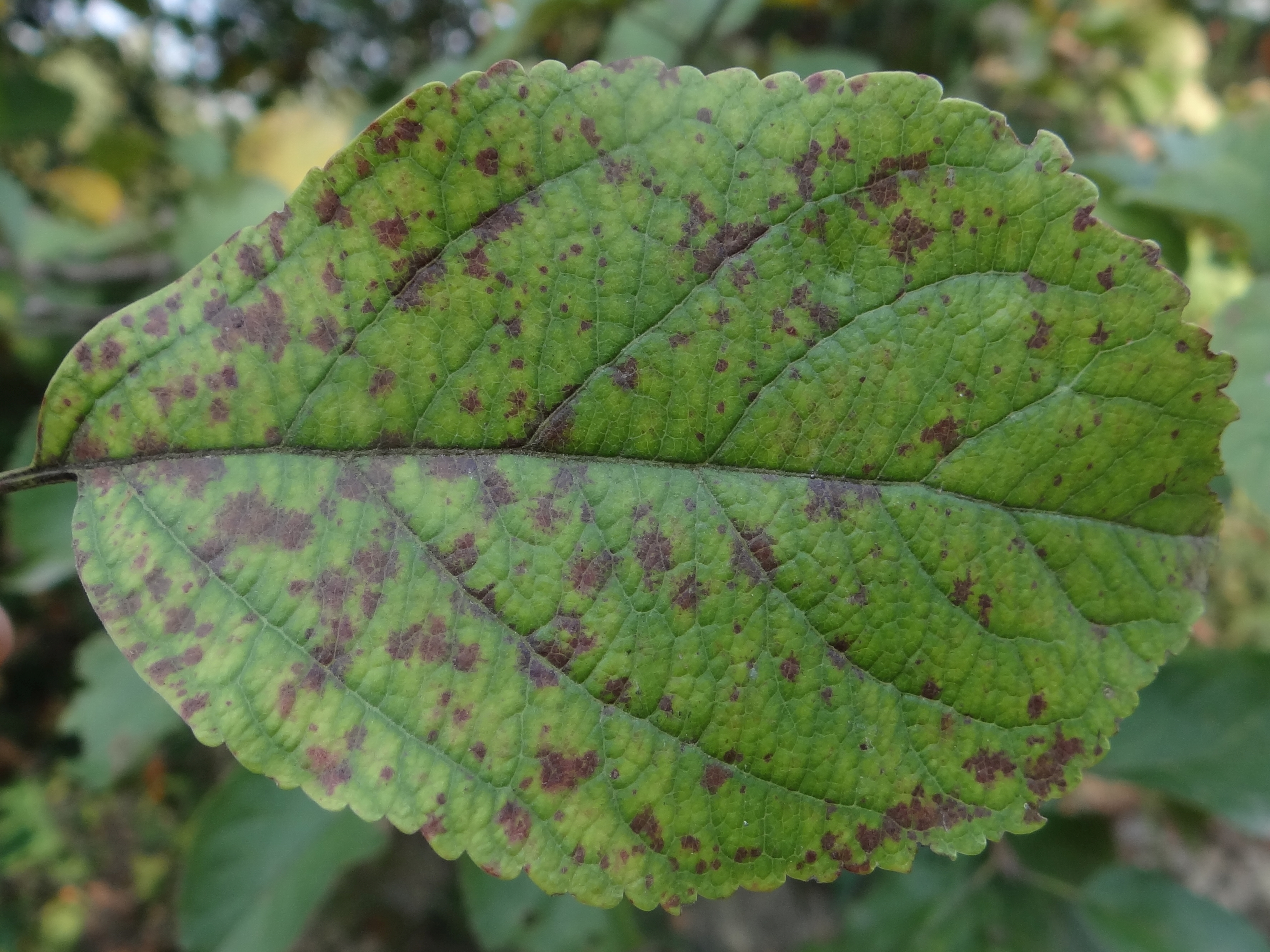 Mycosphaerella pomi on leaf Malus domestica. Location: Poland, Trzciana, województwo małopolskie